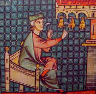 Et klokkespill som spilles med hammere, selv om klokkene har innvendige knabler. Hodeplagget tyder på at det er en intellektuell som spiller.